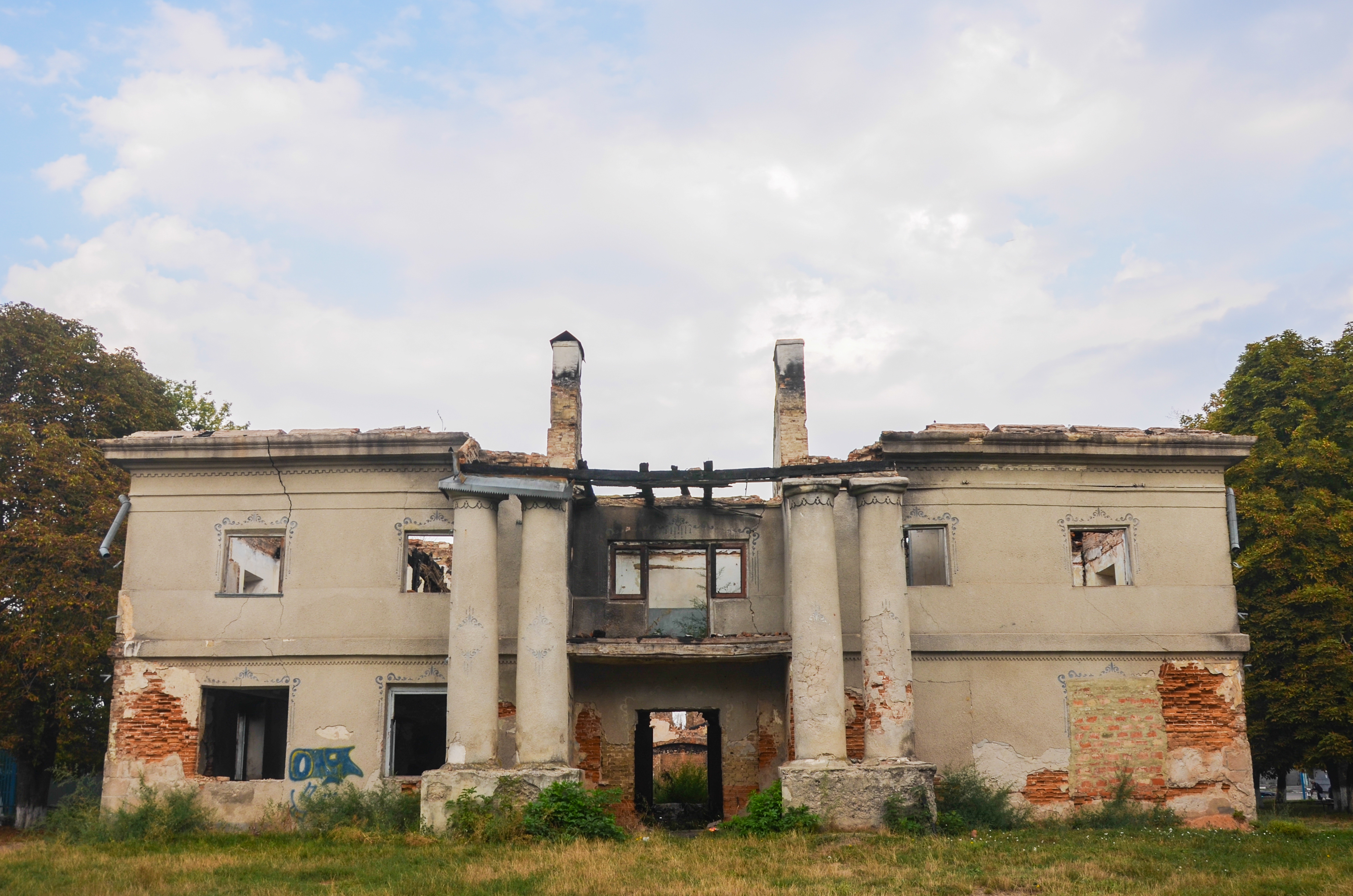 Ратуша у смт. Чорний Острів Хмельницької області була побудована у першій половині 19 століття. Станом на 2015 рік пам'ятка архітектури потребує реставрації.